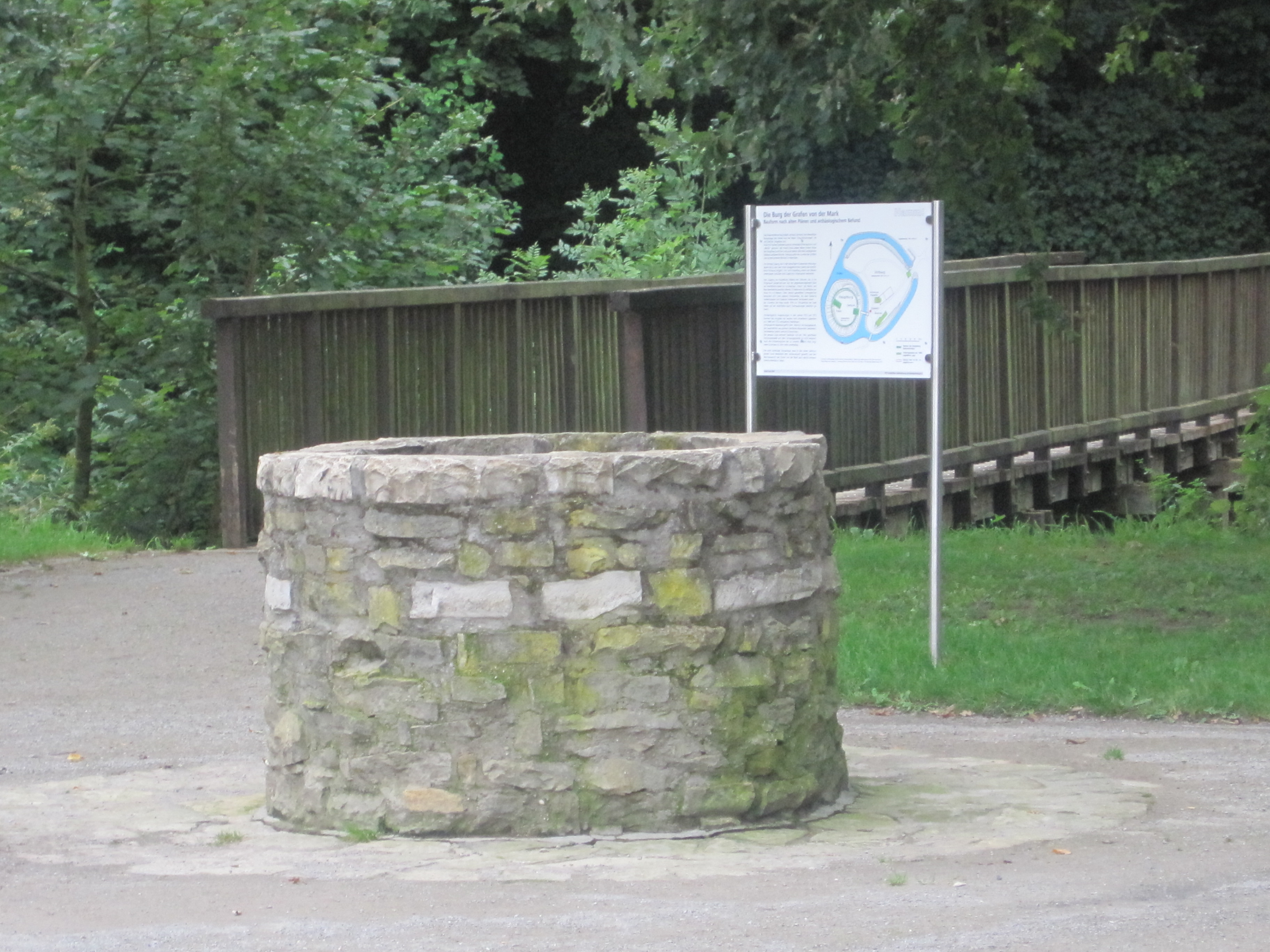 Dieses Foto zeigt den Brunnen auf dem Burghügel zur Mark in Hamm.